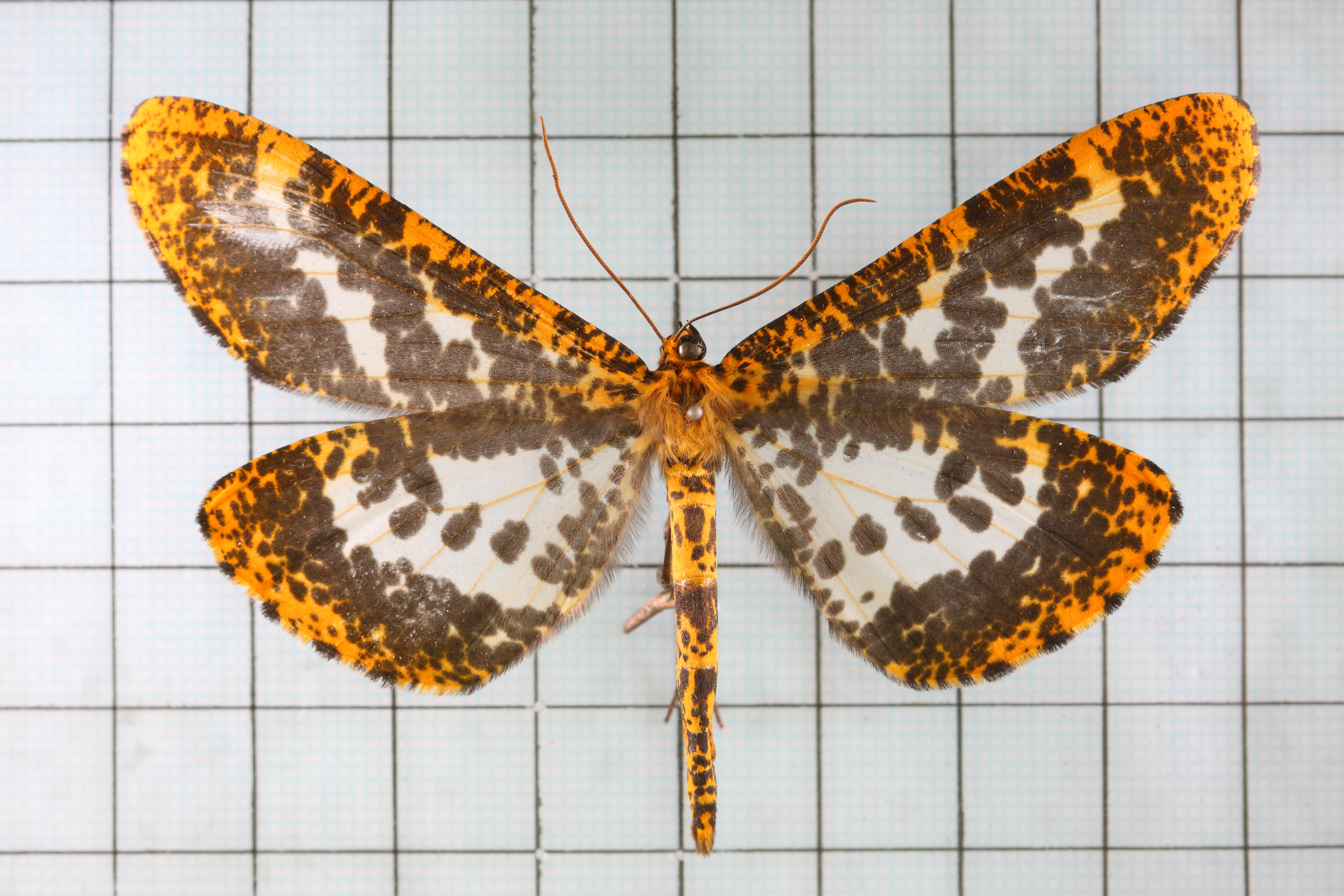 Obeidia gigantearia marginifascia Prout 巨豹紋尺蛾 鞍1:P.33,Pl.7-8